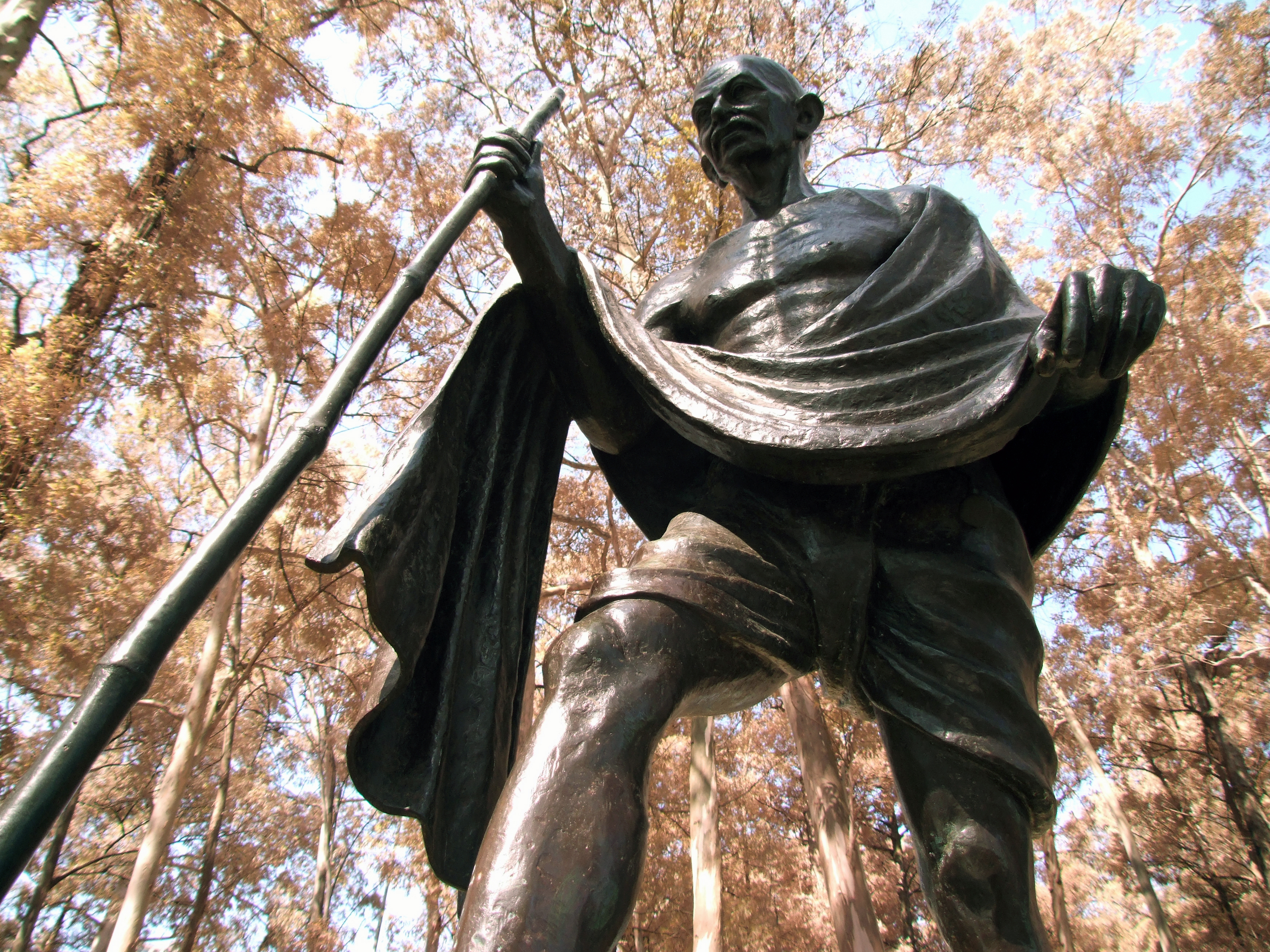 Feita em bronze, a obra de Gautam Pal foi doada pela Índia como reconhecimento ao trabalho da Associação Palas Athena na divulgação do pensamento de Gandhi no Brasil. Com 1,80 de altura e 400 quilos, ficará na praça Túlio Fontoura, numa clareira de um bosque de eucaliptos, entre a Assembléia Legislativa e o parque Ibirapuera, onde será criado o Espaço Gandhi. ( Fonte Folha Online 13/08/2002 - 09h43 )